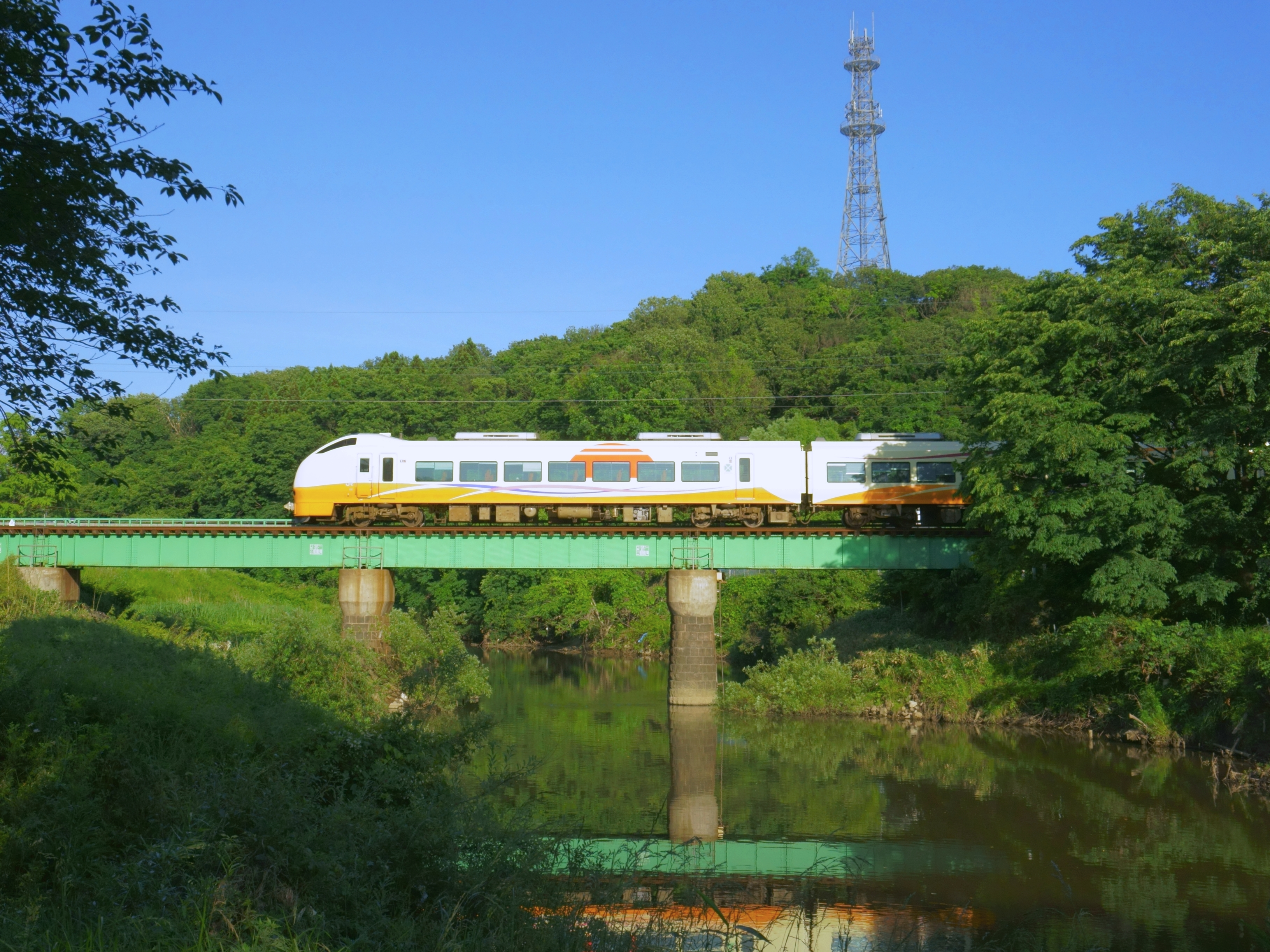 太平川に架かる橋梁を渡る特急「いなほ5号」。後ろの山が金照寺山である。